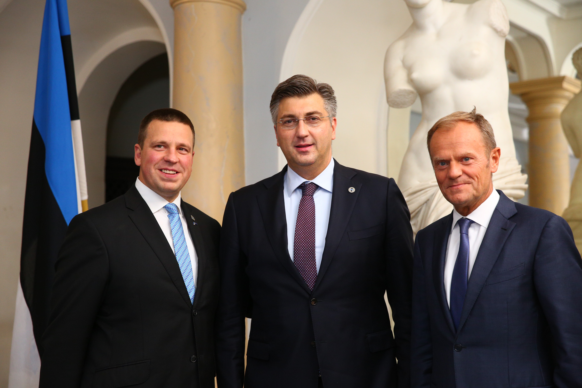 Photo: Arno Mikkor (EU2017EE)